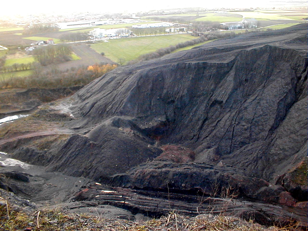 Terril de Saint Antoine démantelé en vue de récupérer le charbon et abandonné à son sort après la faillite de l'entreprise qui effectuait les travaux.